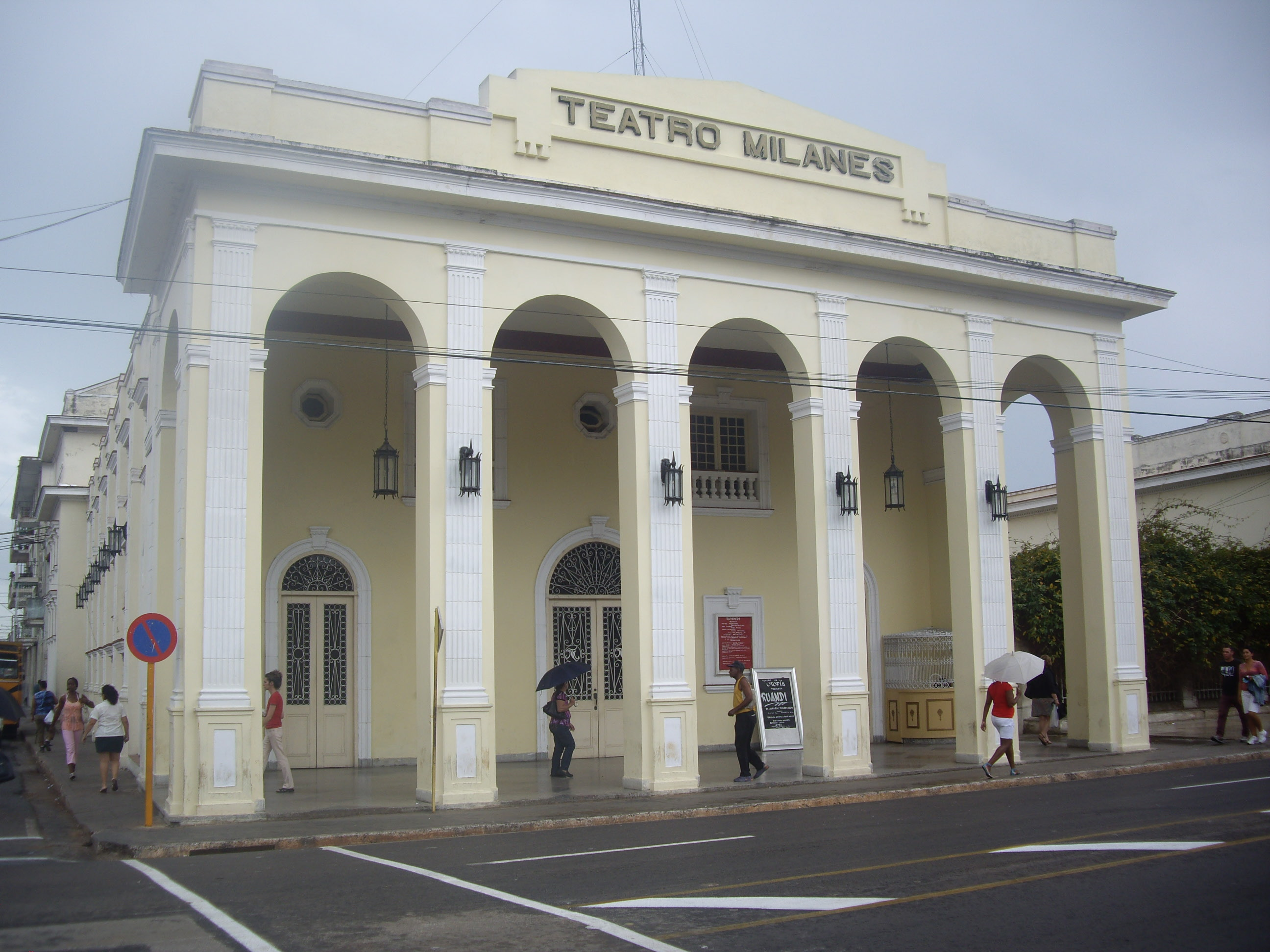 Façana Principal del Teatre Milanés a Pinar del Rio